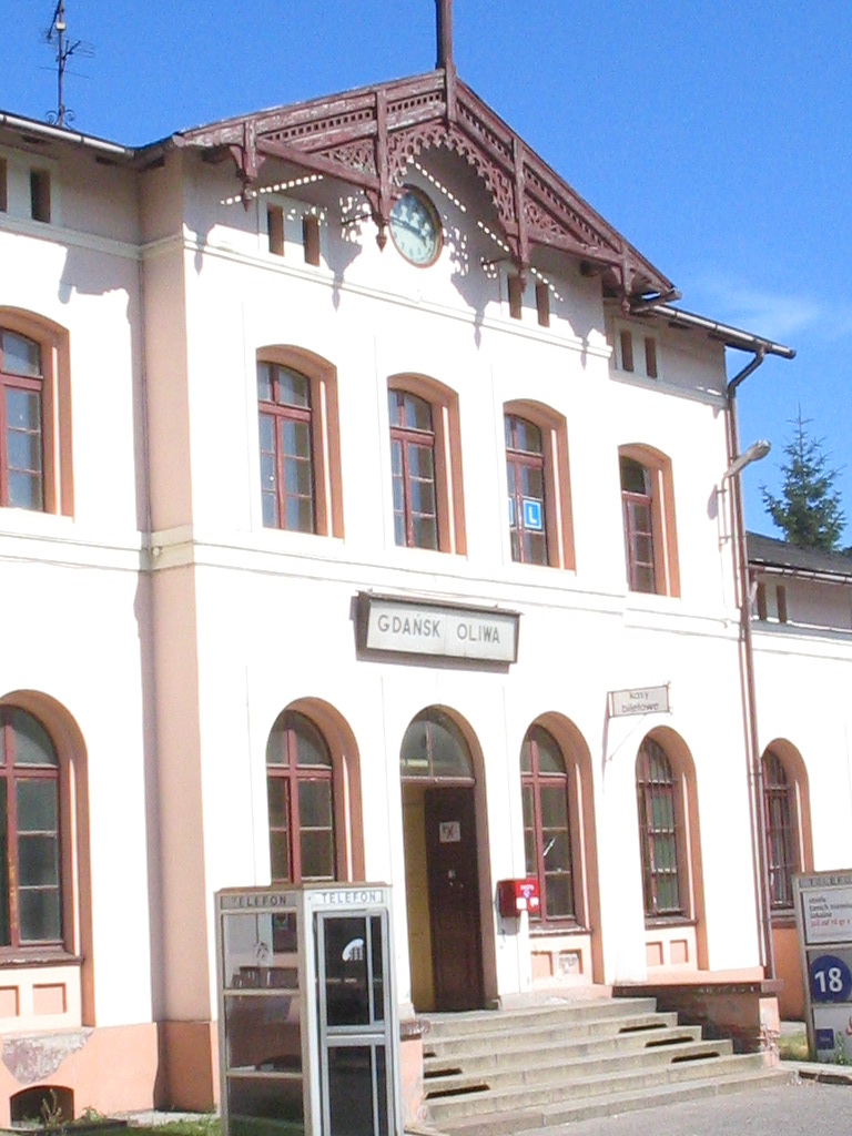 Station Gdansk Oliwa, july 2005, Poland